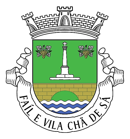 Brasão da Freguesia de Faíl e Vila Chã de Sá